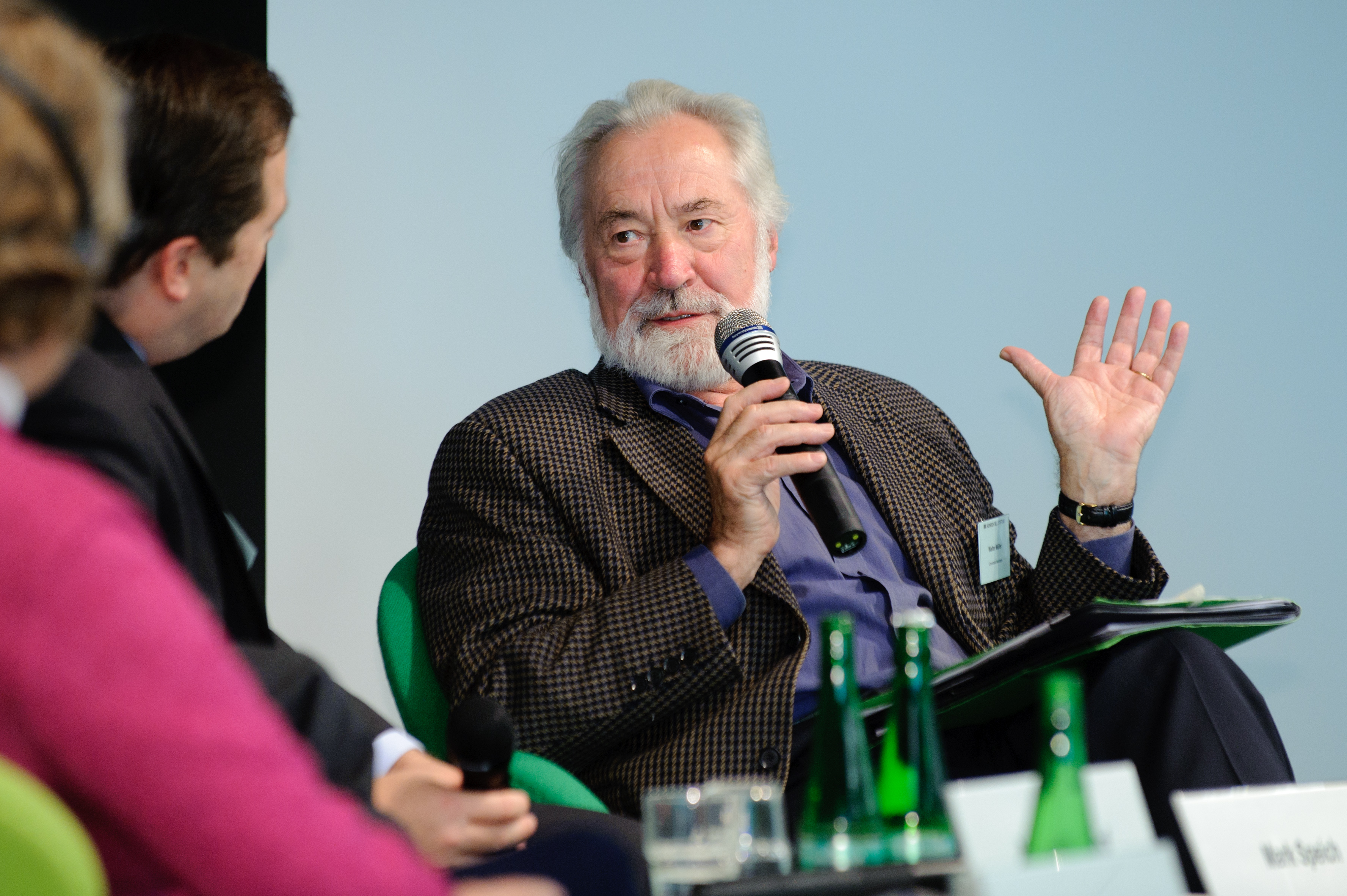 20101027-DSC_5408